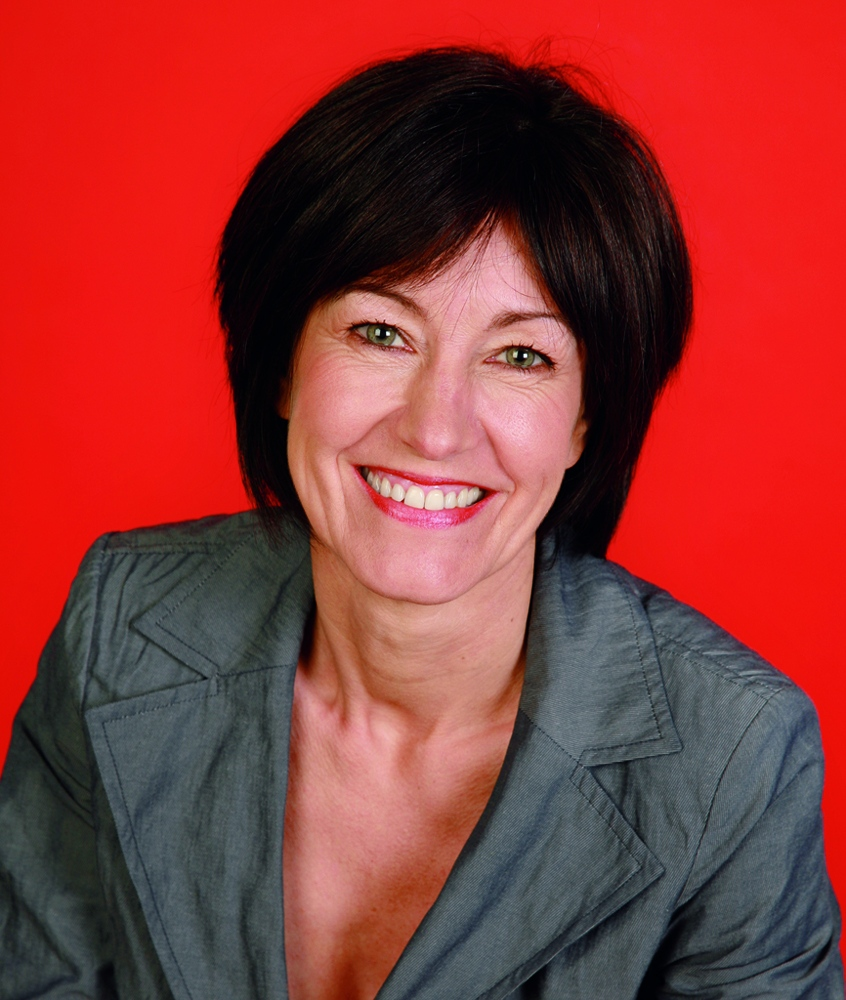 Photo de Laurette Onkelinx